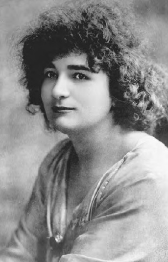 Ellen Key